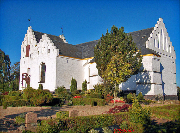 fra sydøst